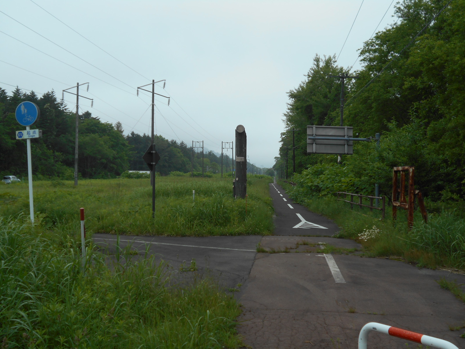 北海道道872号支笏湖公園自転車道線始点 北海道苫小牧市丸山